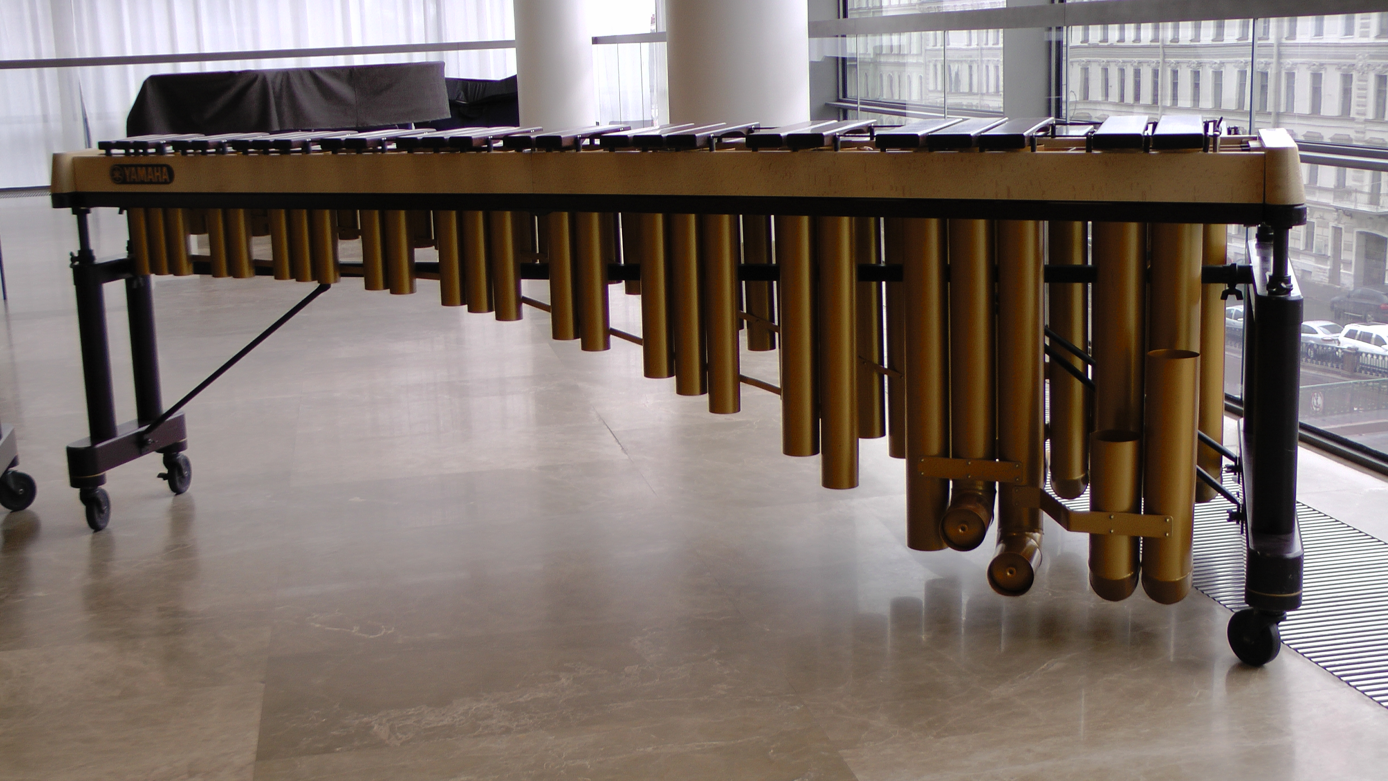 Маримба Yamaha 6100, разработанная при участии Кэйко Абэ.